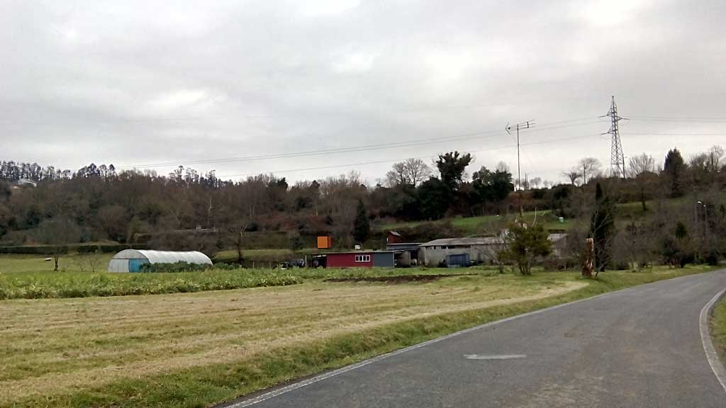 Vista do Chao, Doso, Narón.